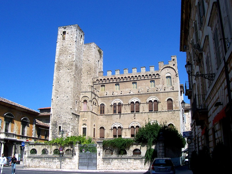 Ascoli Piceno - Palazzo Merli